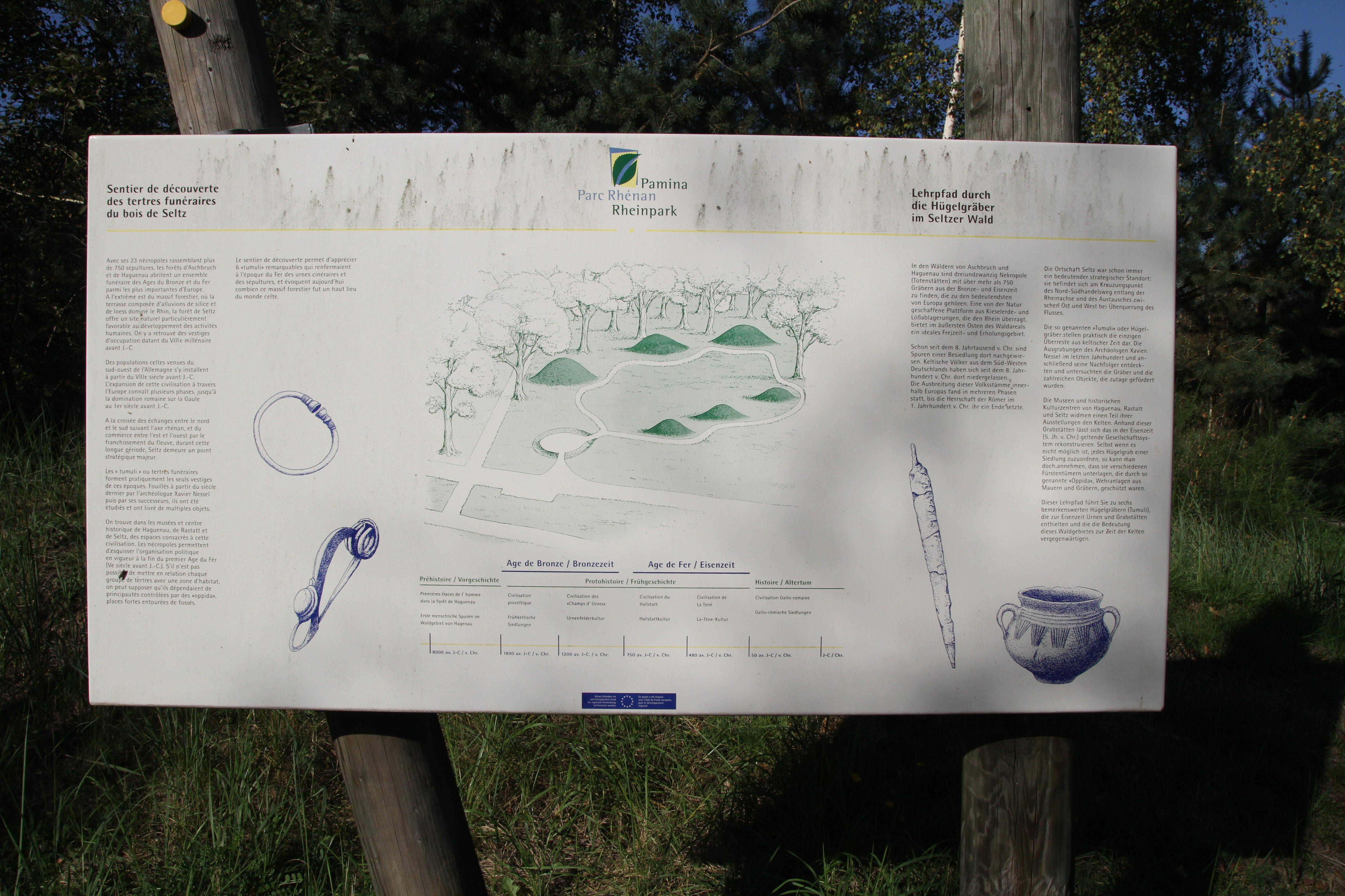 Dies ist das Foto einer Hinweistafel des Parmina Rundweges, der auf eine 10.000 Jahre altes Hügelgrabfeld hin weißt. Das Grabfeld befindet sich in der Nähe von Seltz auf der Straße nach Hatten.